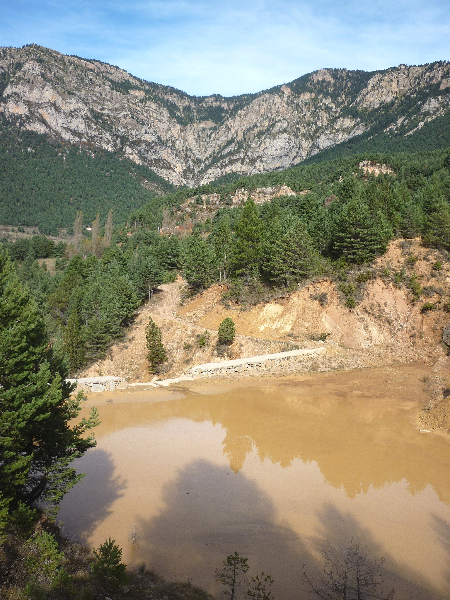 Presa de retenció de les Terreres de Pratformiu. A dalt, Cap de Prat d'aubes i Urdet